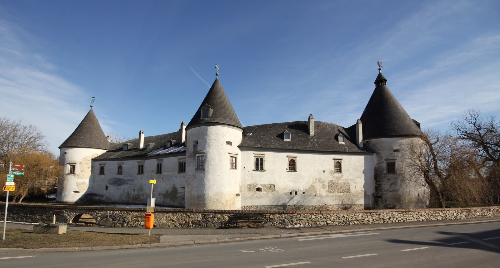 A kaboldi vár